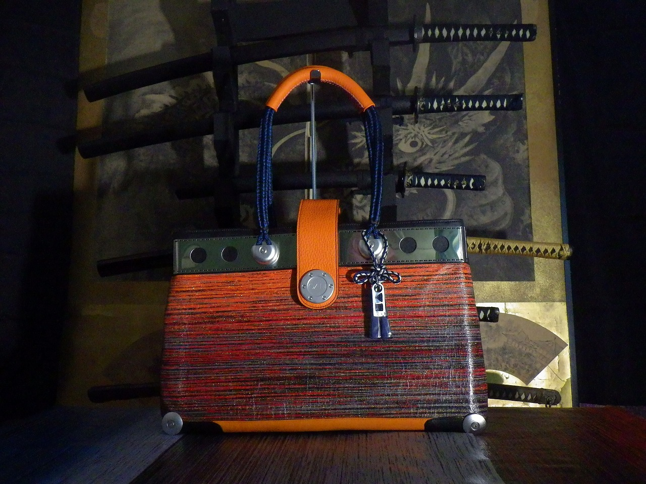 デン・コーポレーション製 トートバッグ 京都